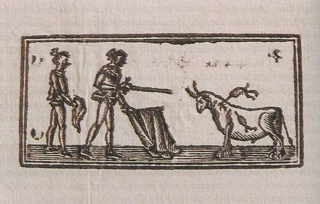 Toreros del siglo XVIII. Detalle de un aviso taurino.